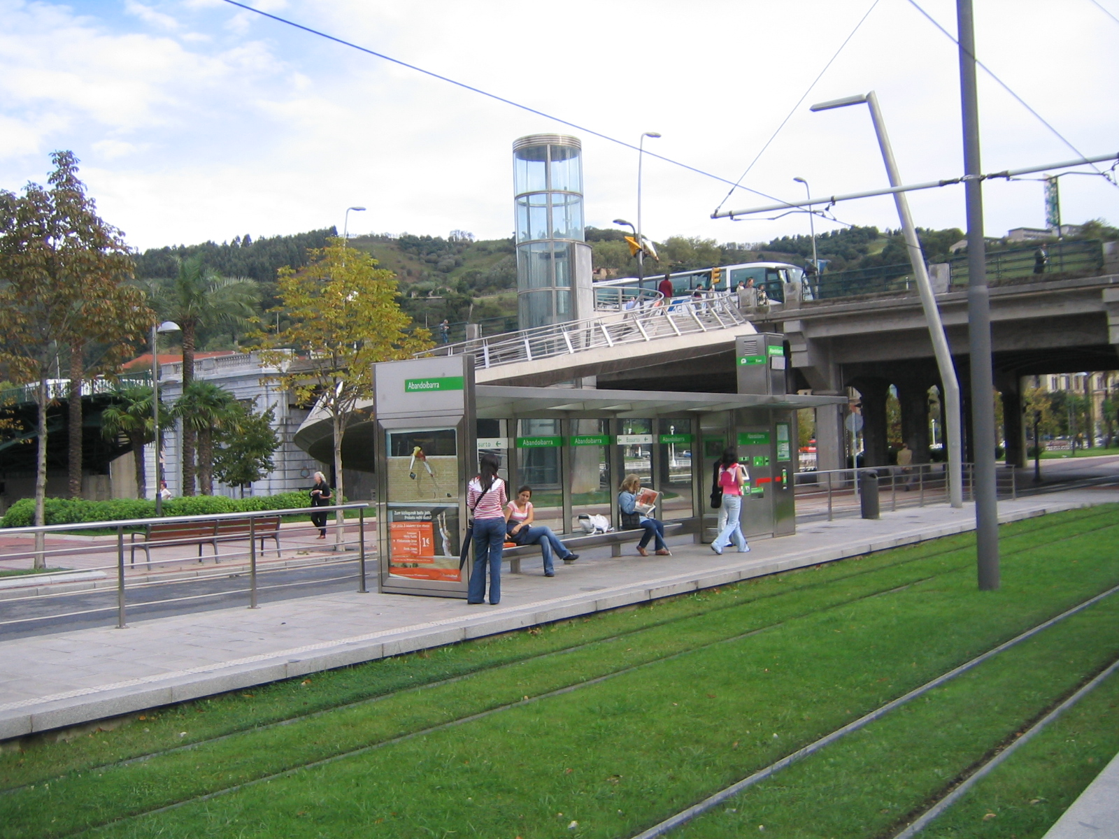 EuskoTran's Abandoibarra station, Bilbao, Spain.